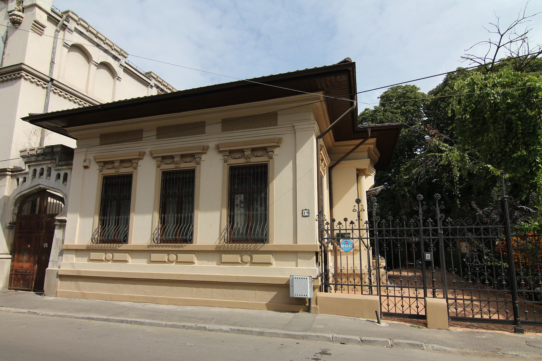 Casă pe Str Romulus